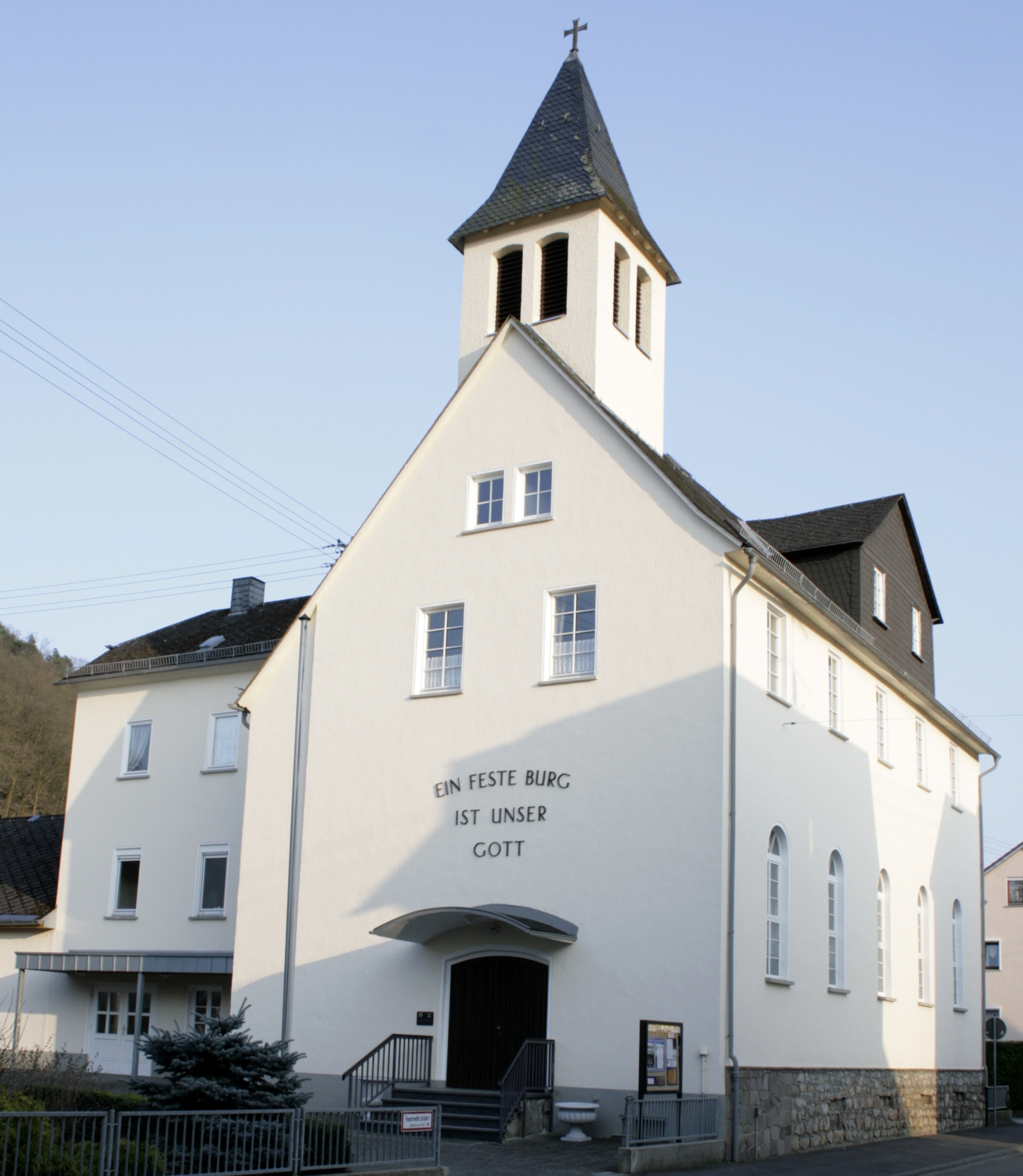 Lutherische Kirche in Steeden, Deutschland